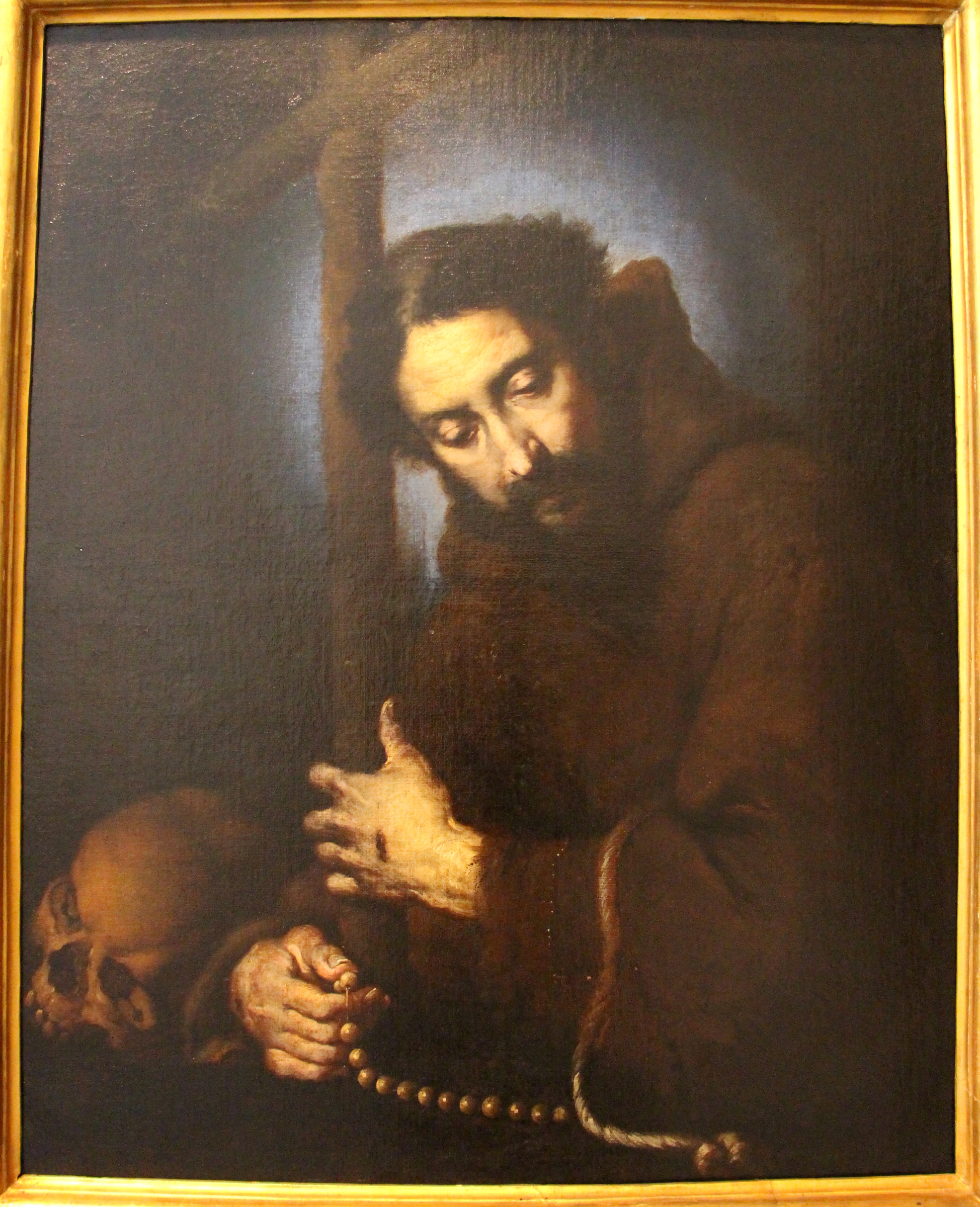 Palazzo Rosso - Musei di Strada Nuova The making of this document was supported by Wikimedia CH. (Submit your project!) For all the files concerned, please see the category Supported by Wikimedia CH. This is a photo of a monument which is part of cultural heritage of Italy.